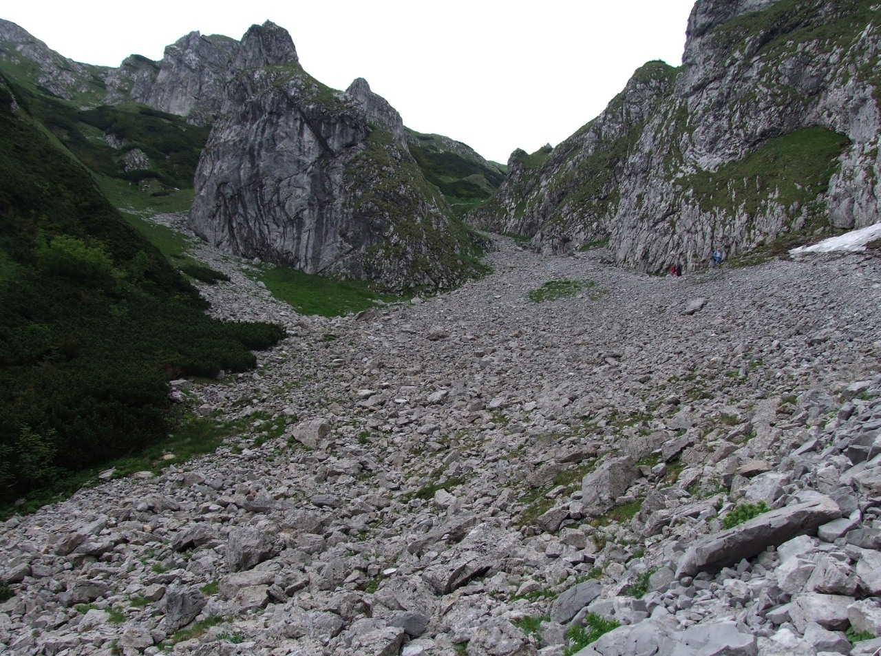 Kobylarzowuy Zleb. Po lewej stronie Szary Żleb.